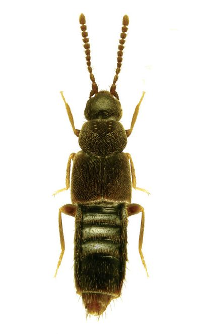 Schistoglossa charlottae